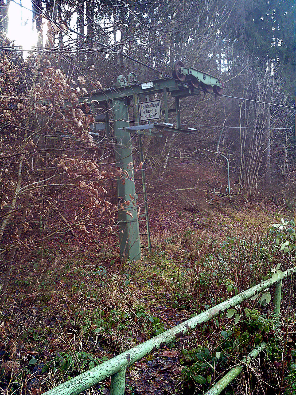 Mast 1 nahe Talstation Kahlenbergbahn, Januar 2014